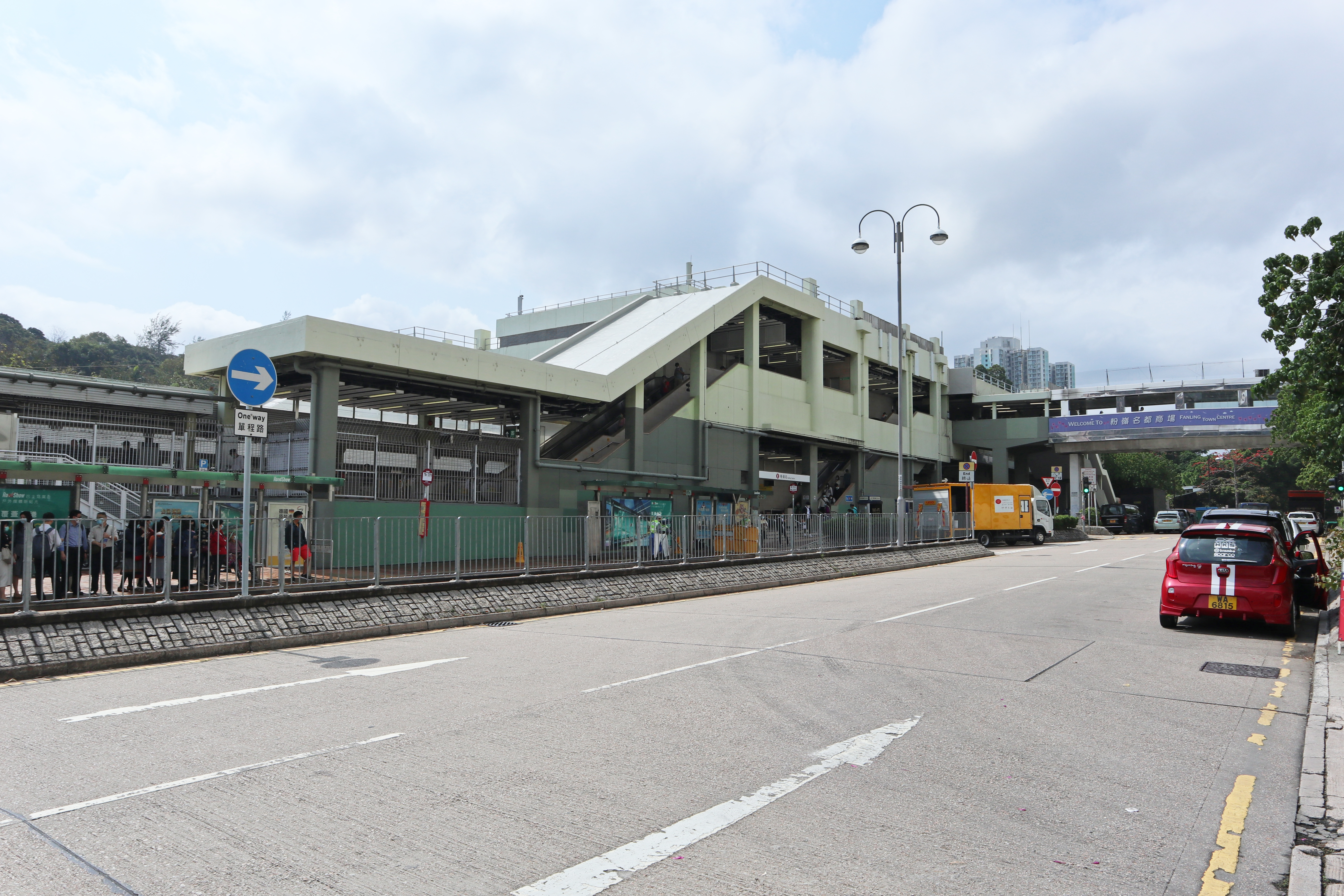 港鐵粉嶺站外觀